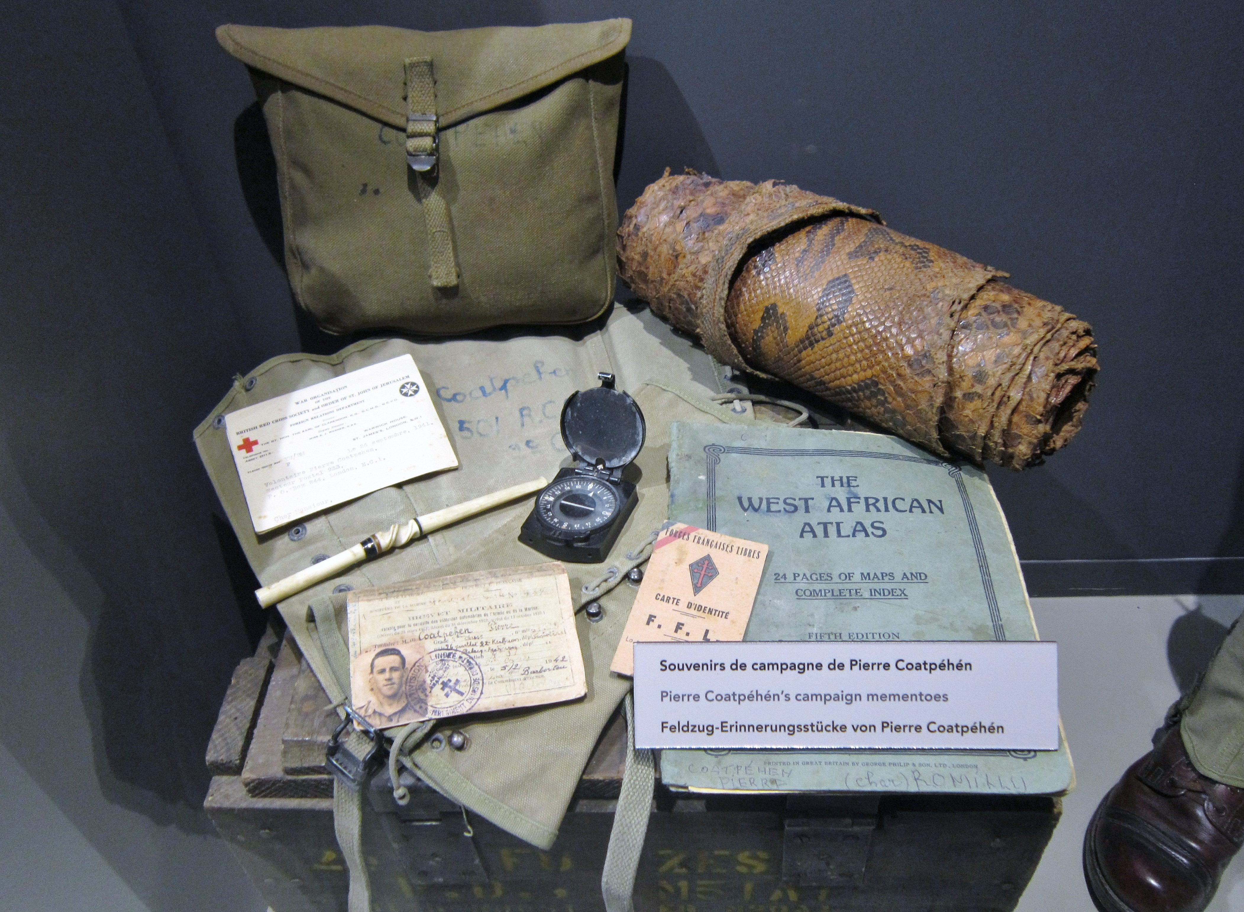 Souvenirs de campagne de Pierre Coatpéhen, du Relecq-Kerhuon, membre des Forces françaises libres et de la Deuxième DB (Musée Mémoires 39-45 à Plougonvelin).